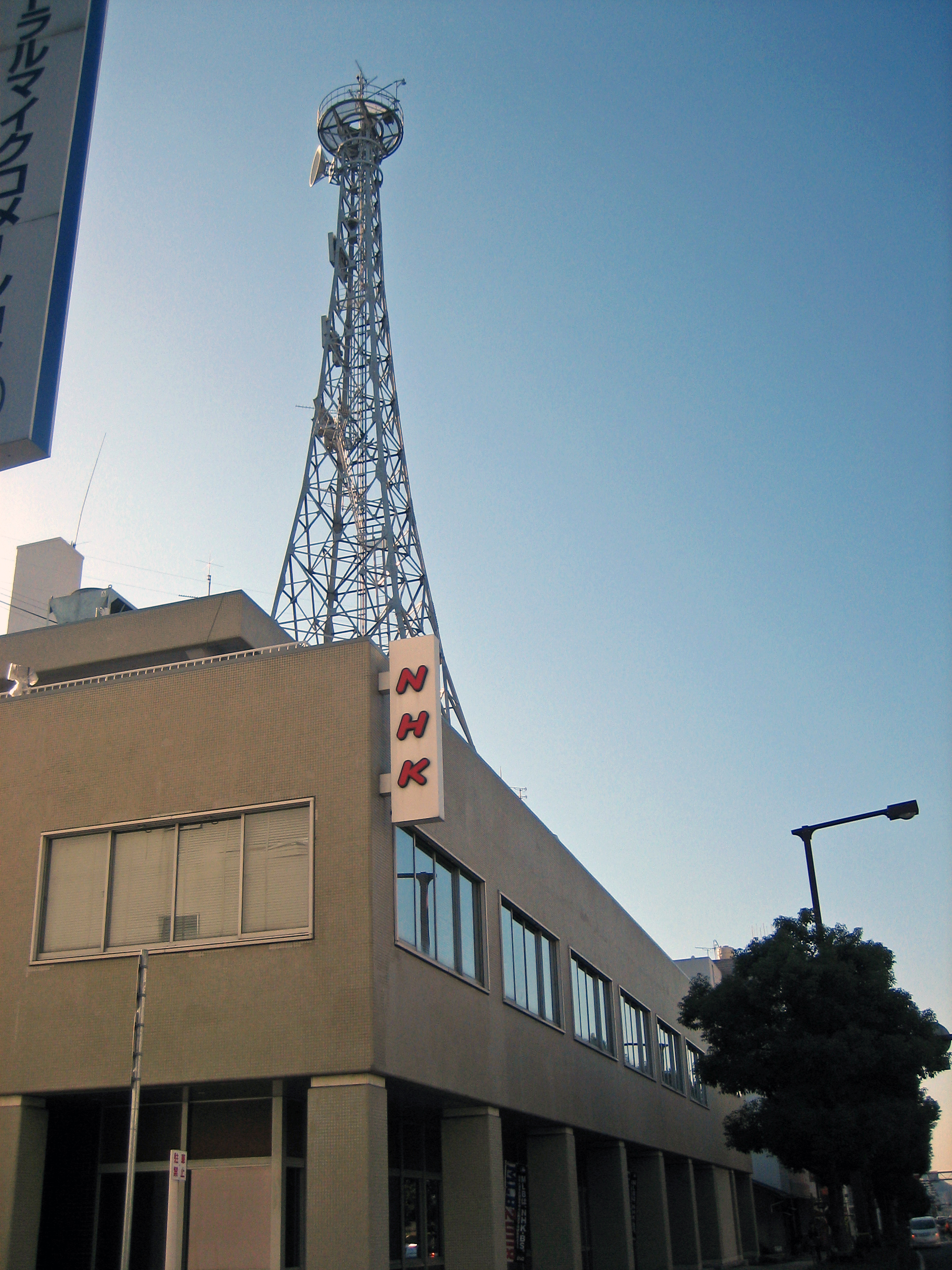 NHK姫路支局ビル。